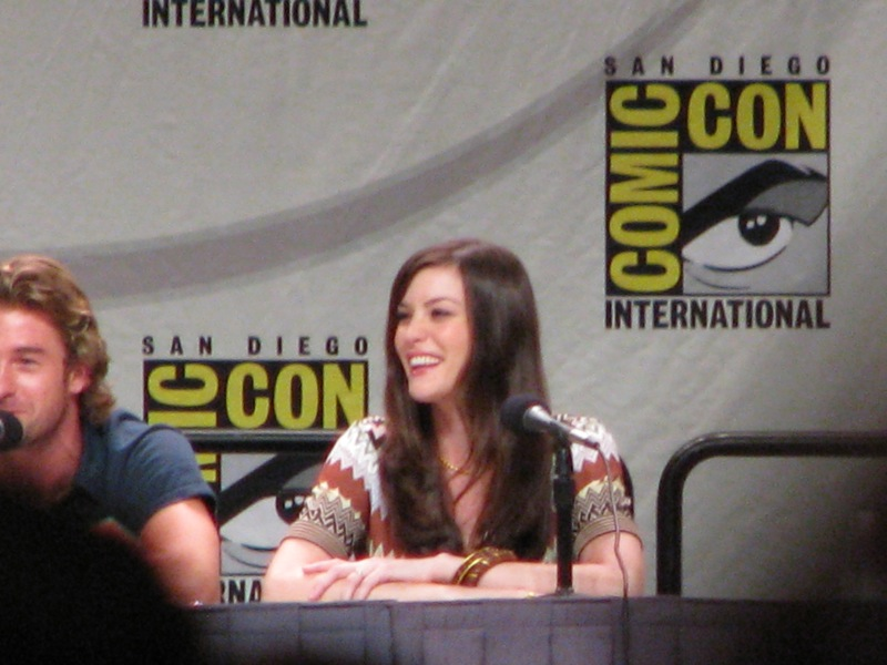 Liv Tyler. Durante el panel de Lion's Gate films, comentando sobre la película The Strangers